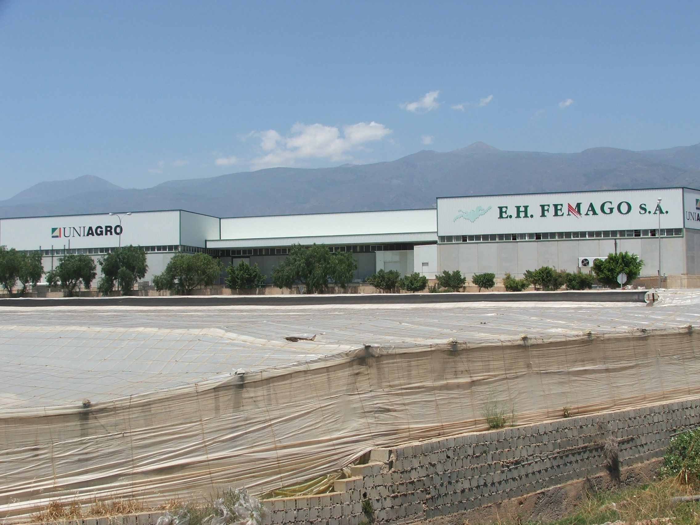 Fotografía de instalaciones de la empresa agroalimentaria de Almería, Andalucía, España.